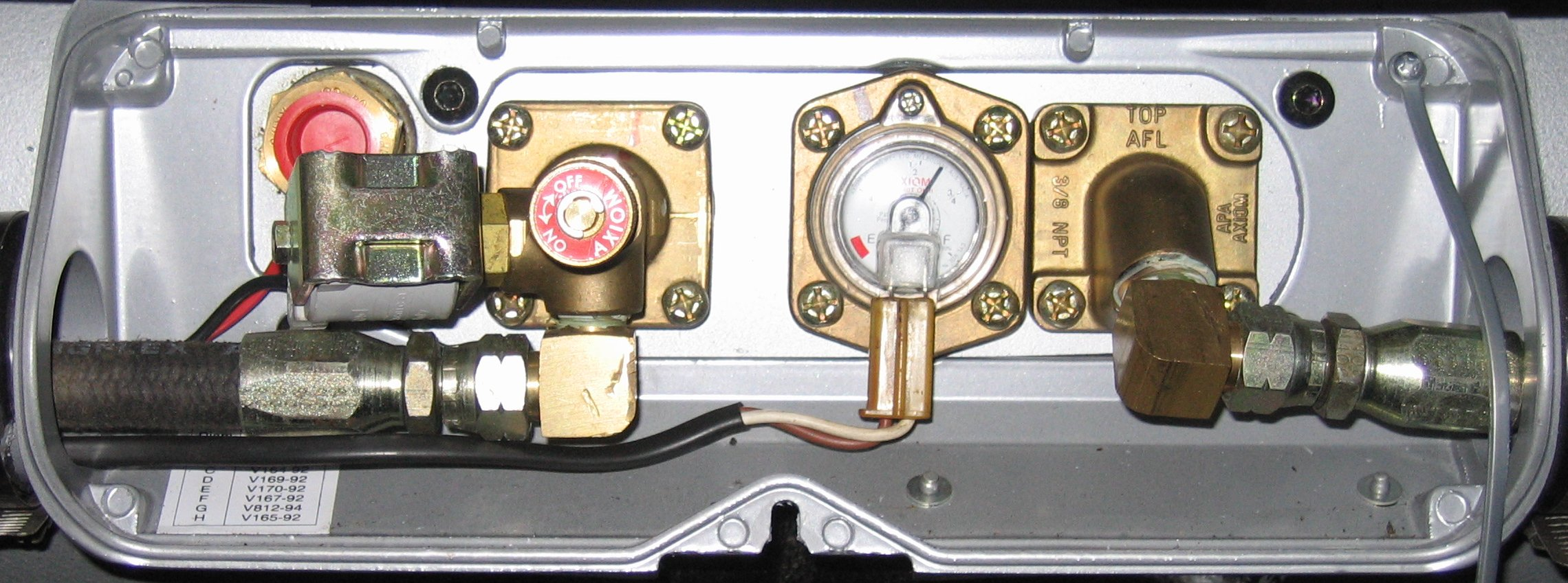 Autogas (LPG) tank valves